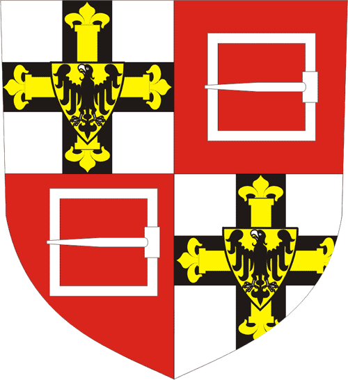 Teutonic Order - Coat of Arms of the Grandmaster Wappen des Hochmeisters des Deutschen Ordens Konrad von Wallenrode